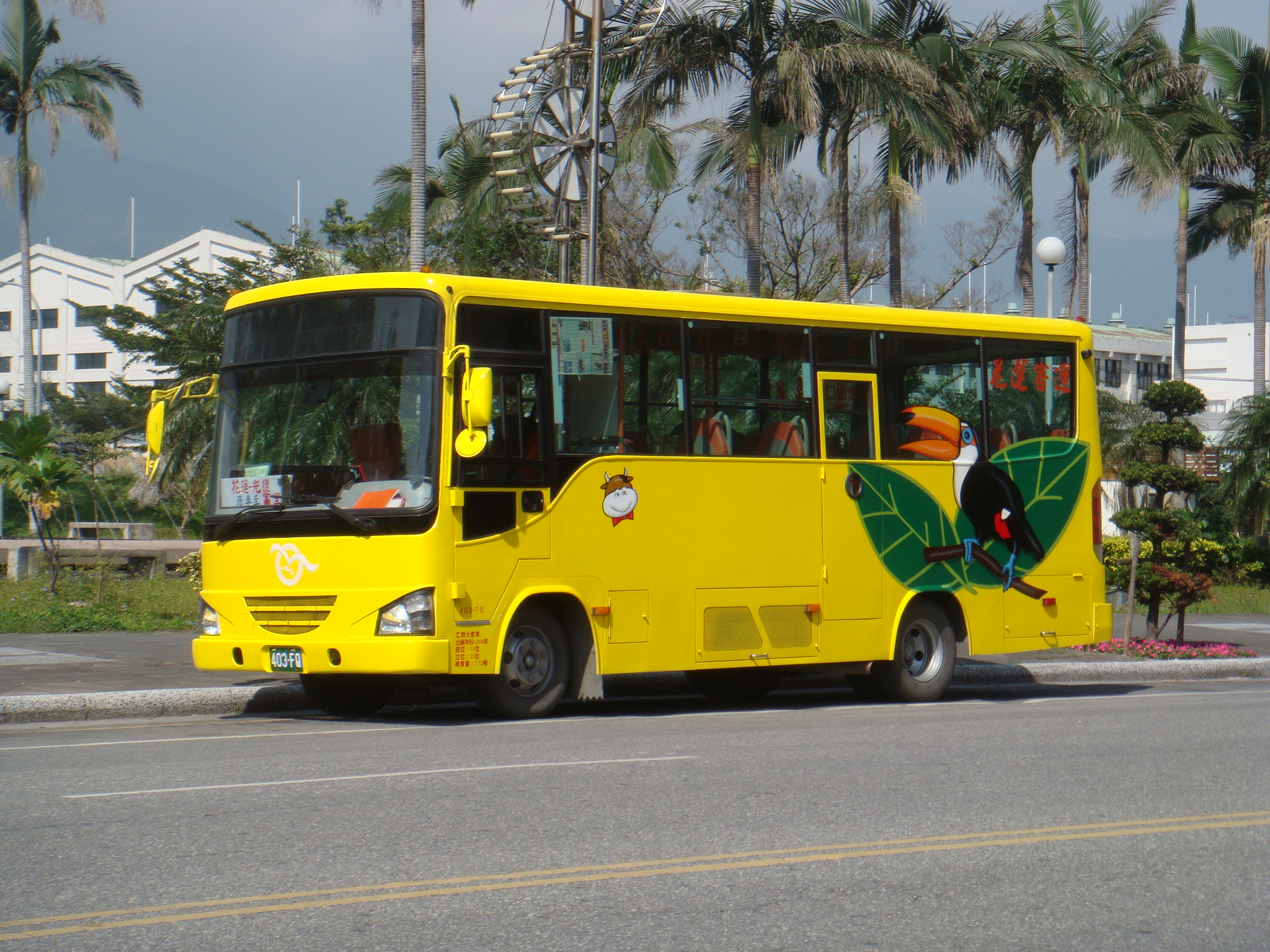 花蓮客運403-FQ 1121花蓮→光復